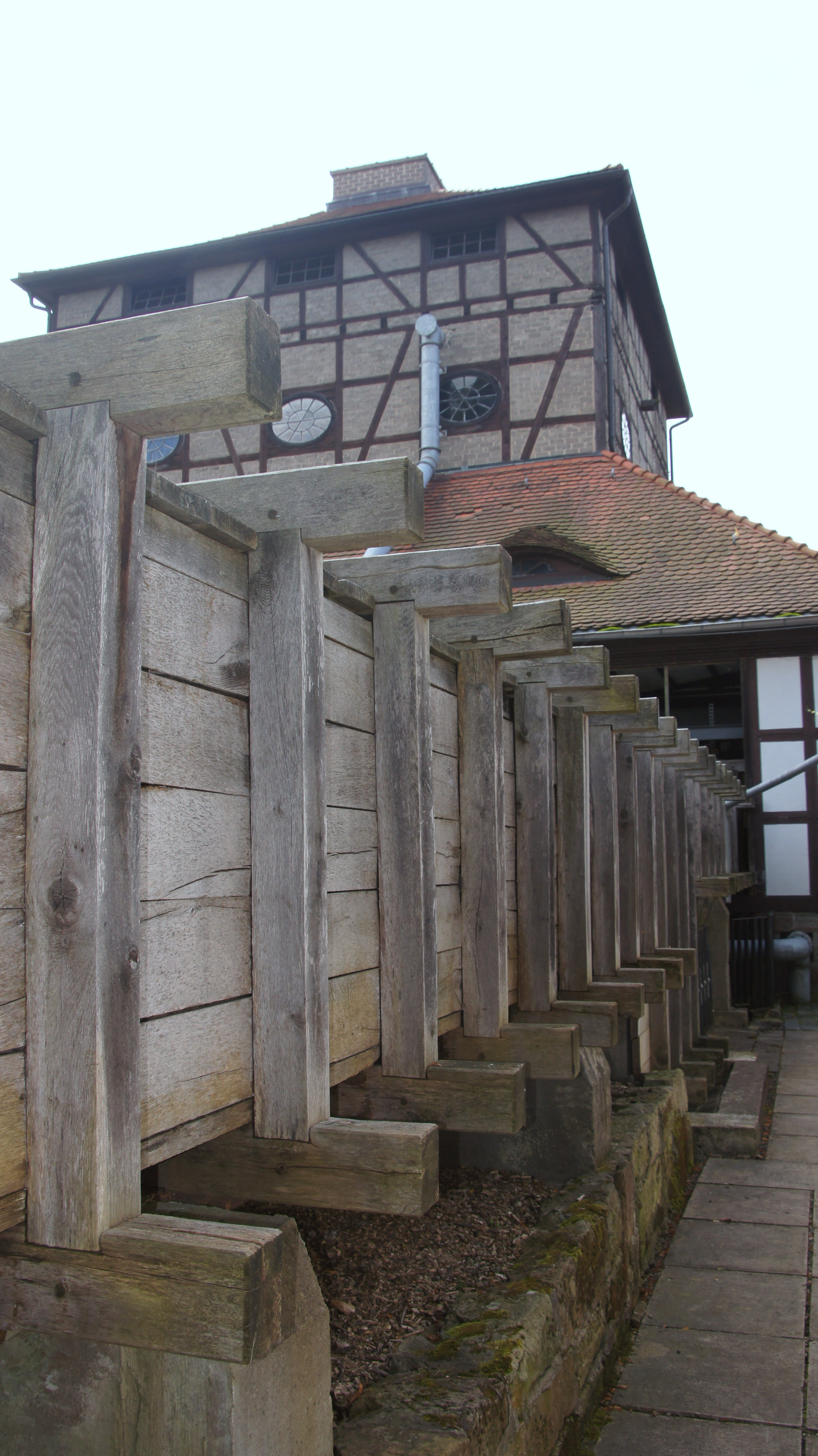 Die Wasserzuführung für das Wasserrad im Maschinenhaus auf dem Gelände des technischen Museum "Neue Hütte" in Schmalkalden.